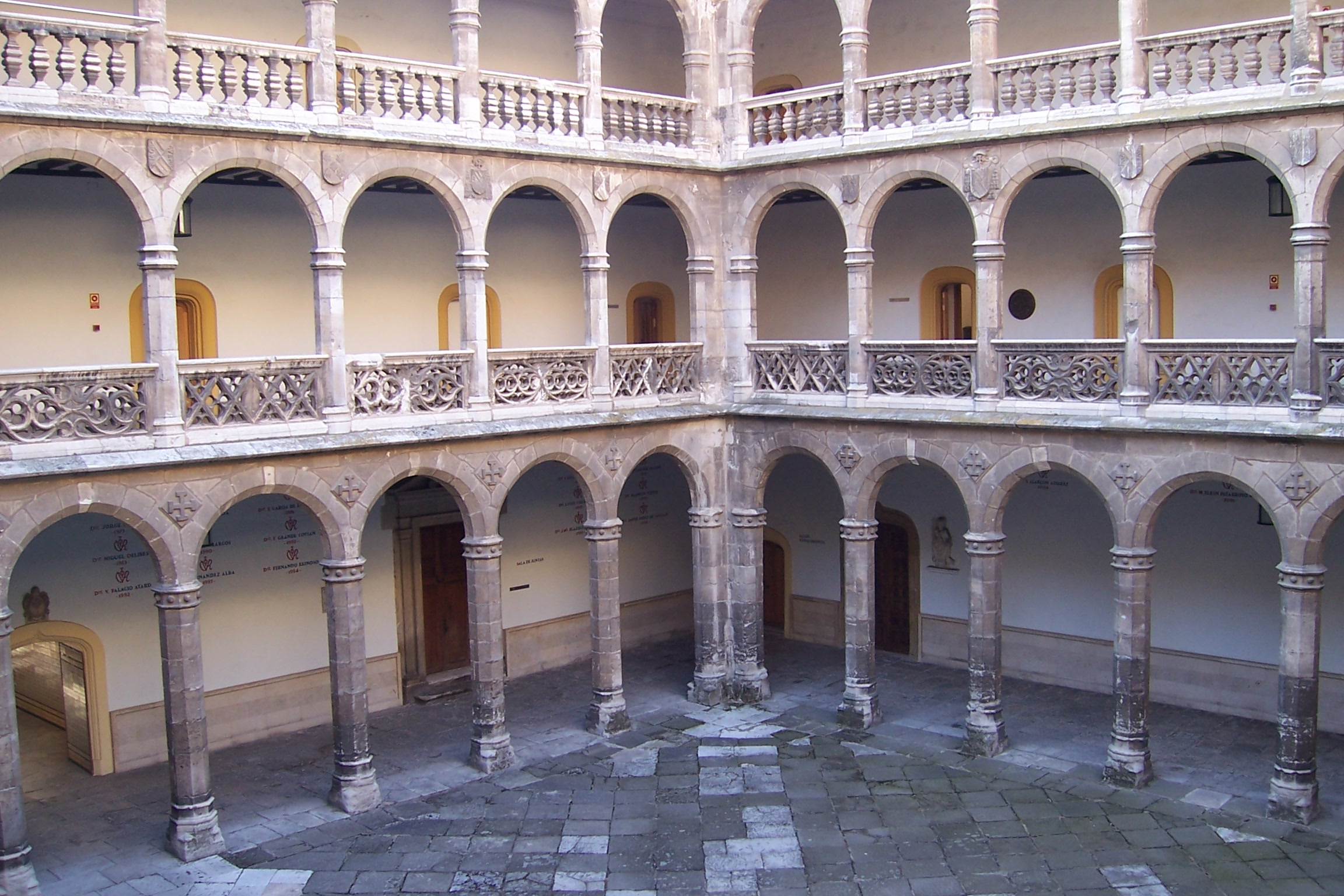 Patio del Colegio de Santa Cruz (o Palacio de Santa Cruz) en la ciudad de Valladolid, España.